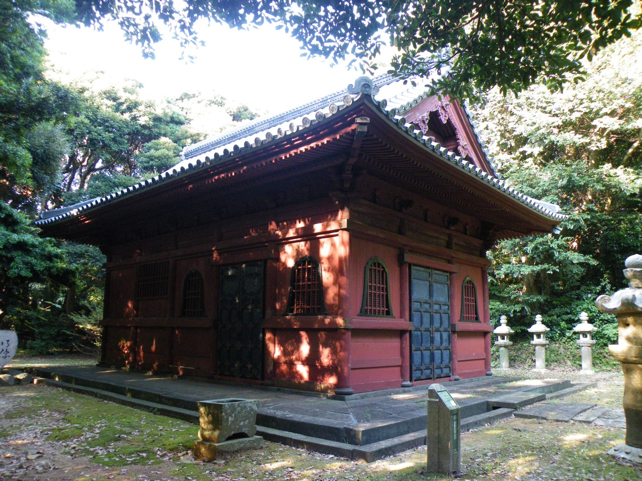 雄香寺開山堂（長崎県平戸市）